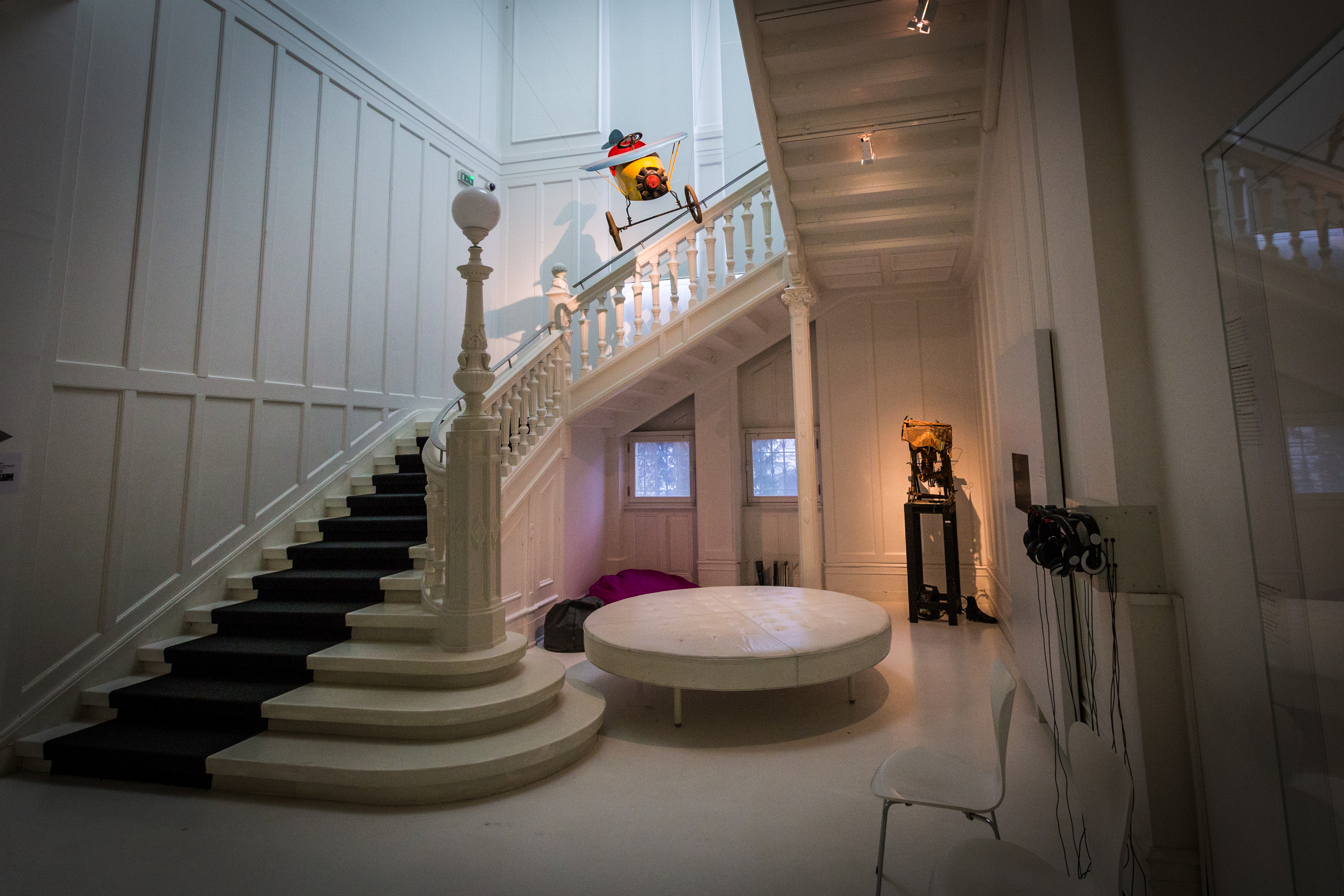 Le Musée Tomi Ungerer à Strasbourg